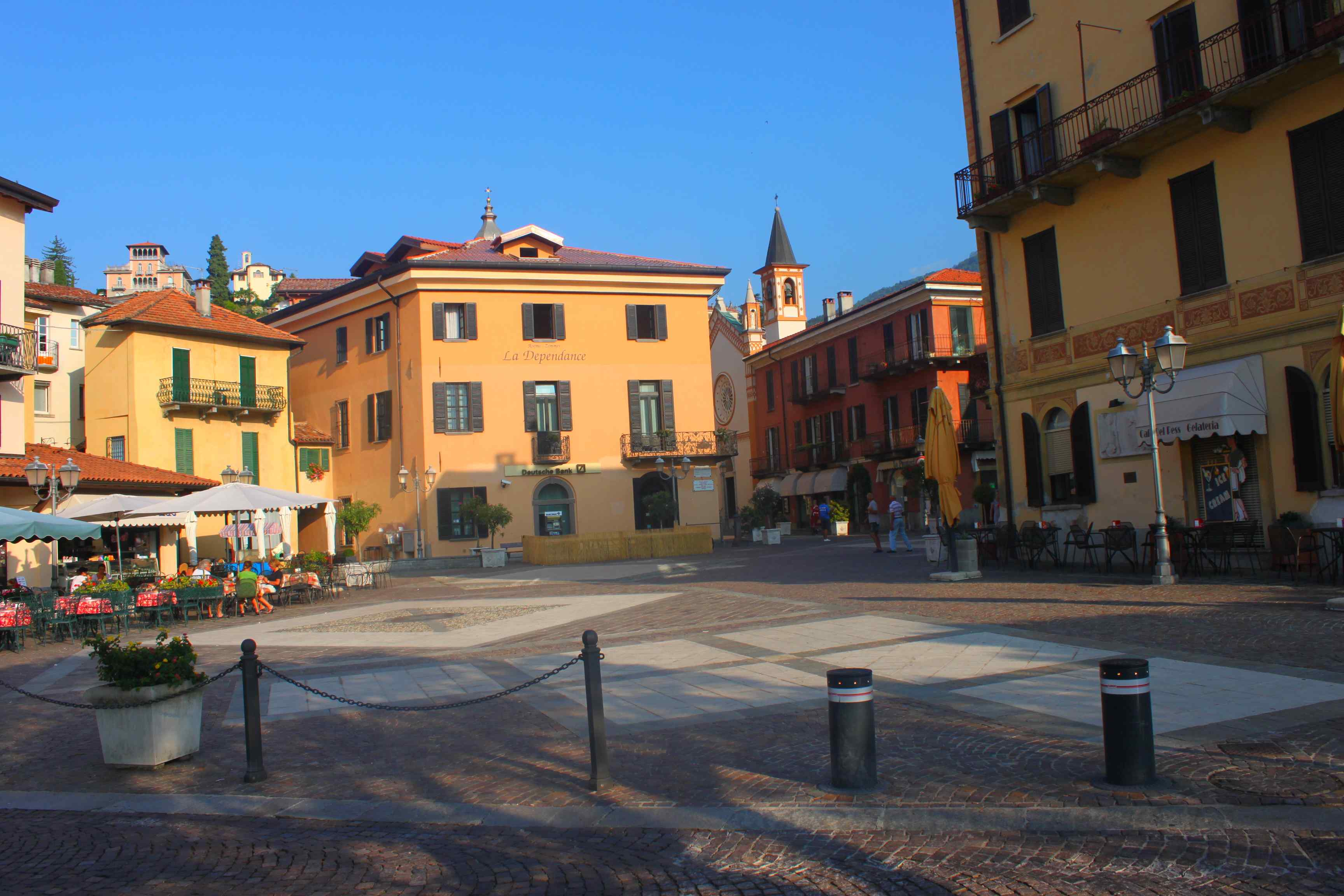 Die Piazza Garibaldi ist der Hauptplatz, direkt am See